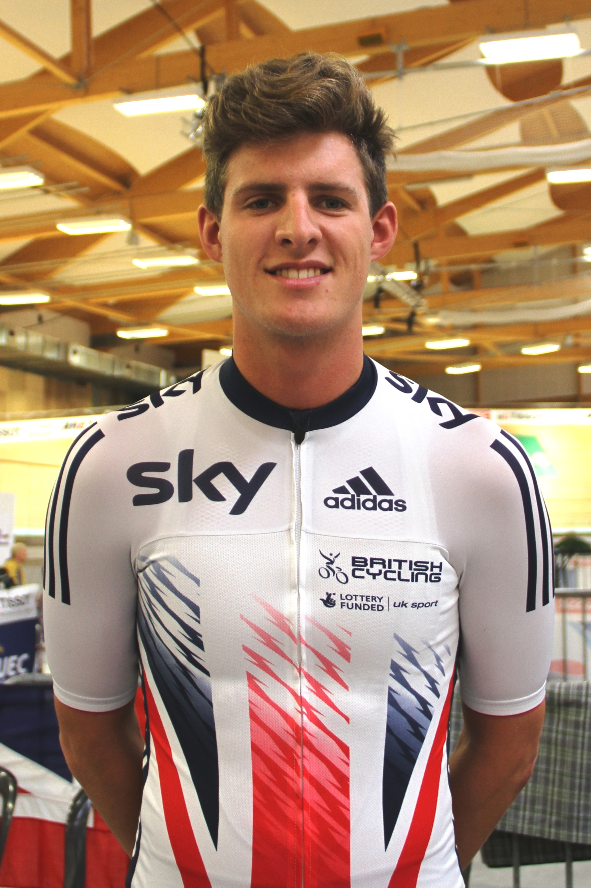 Christopher Latham, britischer Radsportler The making of this document was supported by the Community-Budget of Wikimedia Germany.